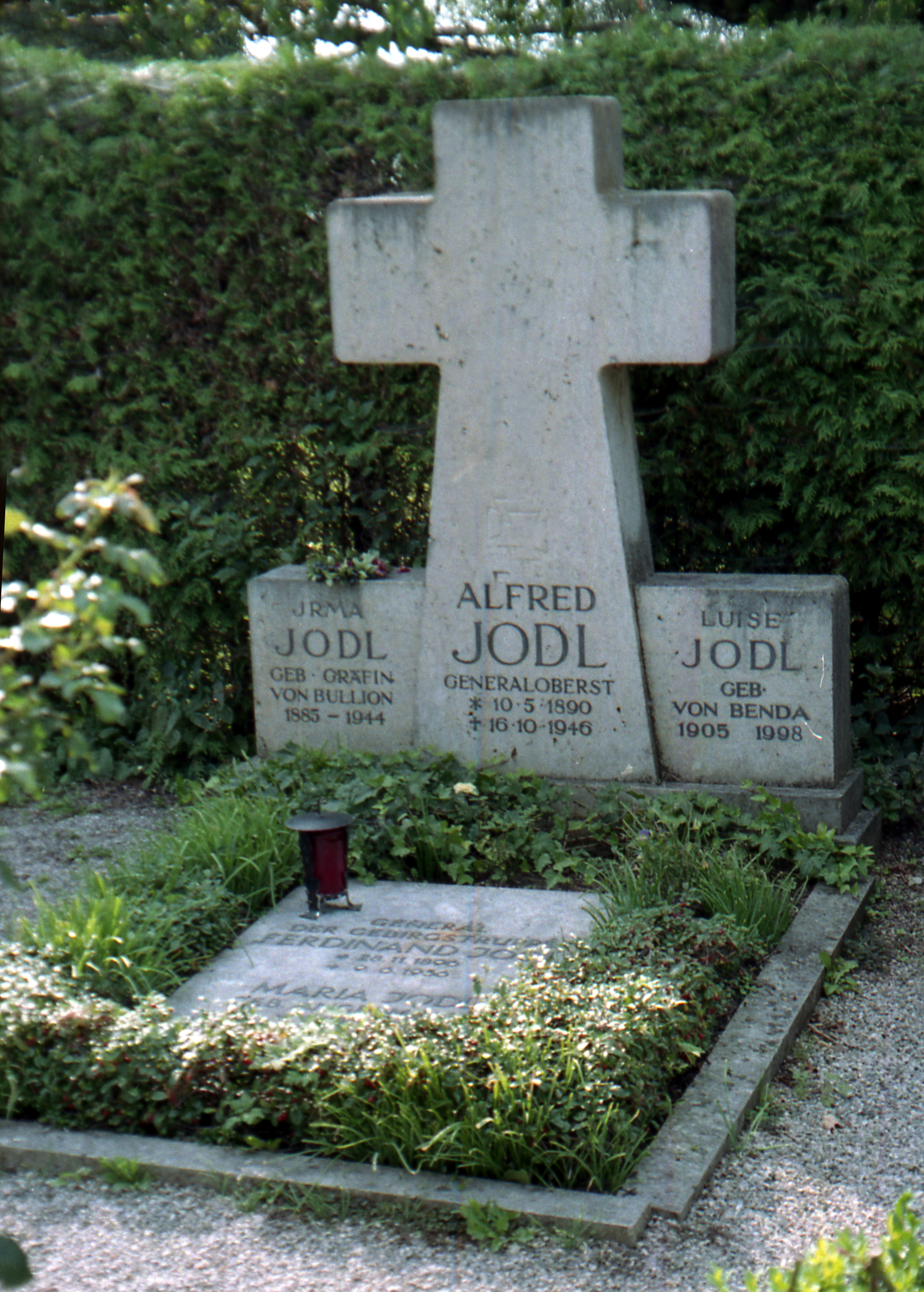 Grab der Familie Jodl in Frauenchiemsee.